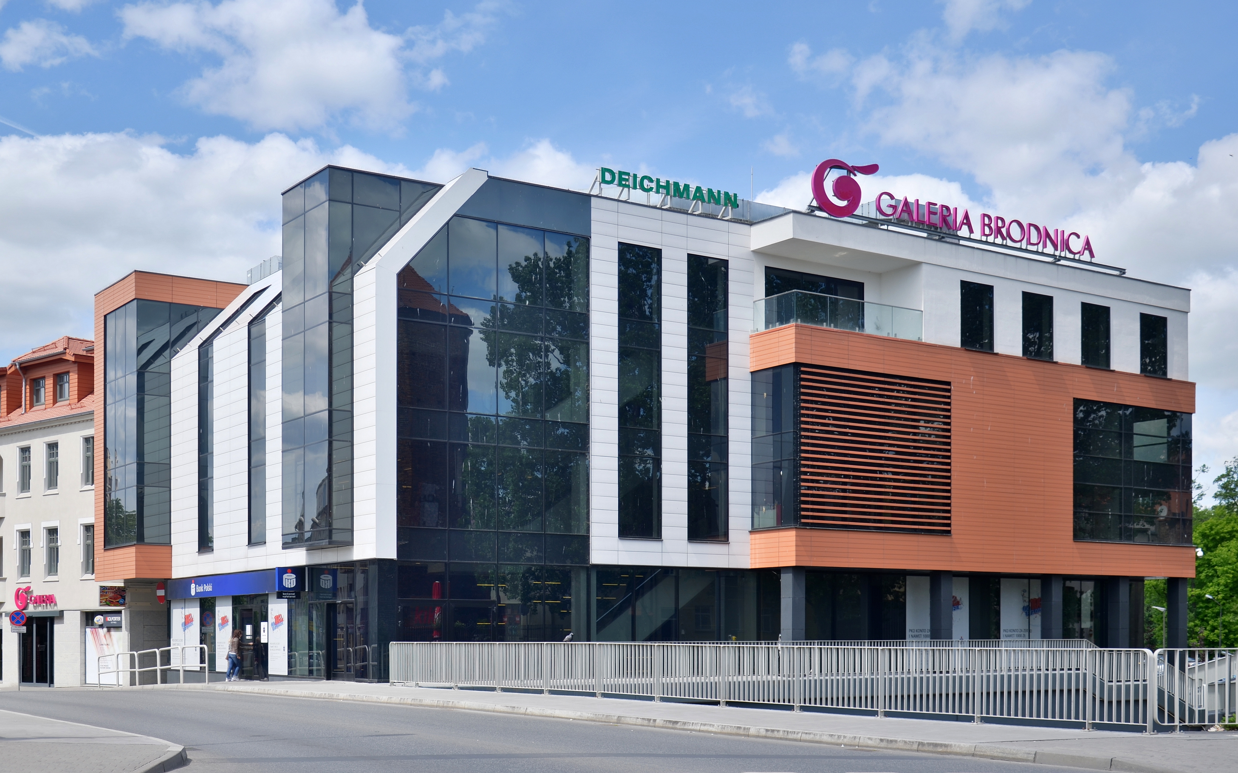 Galeria Brodnica